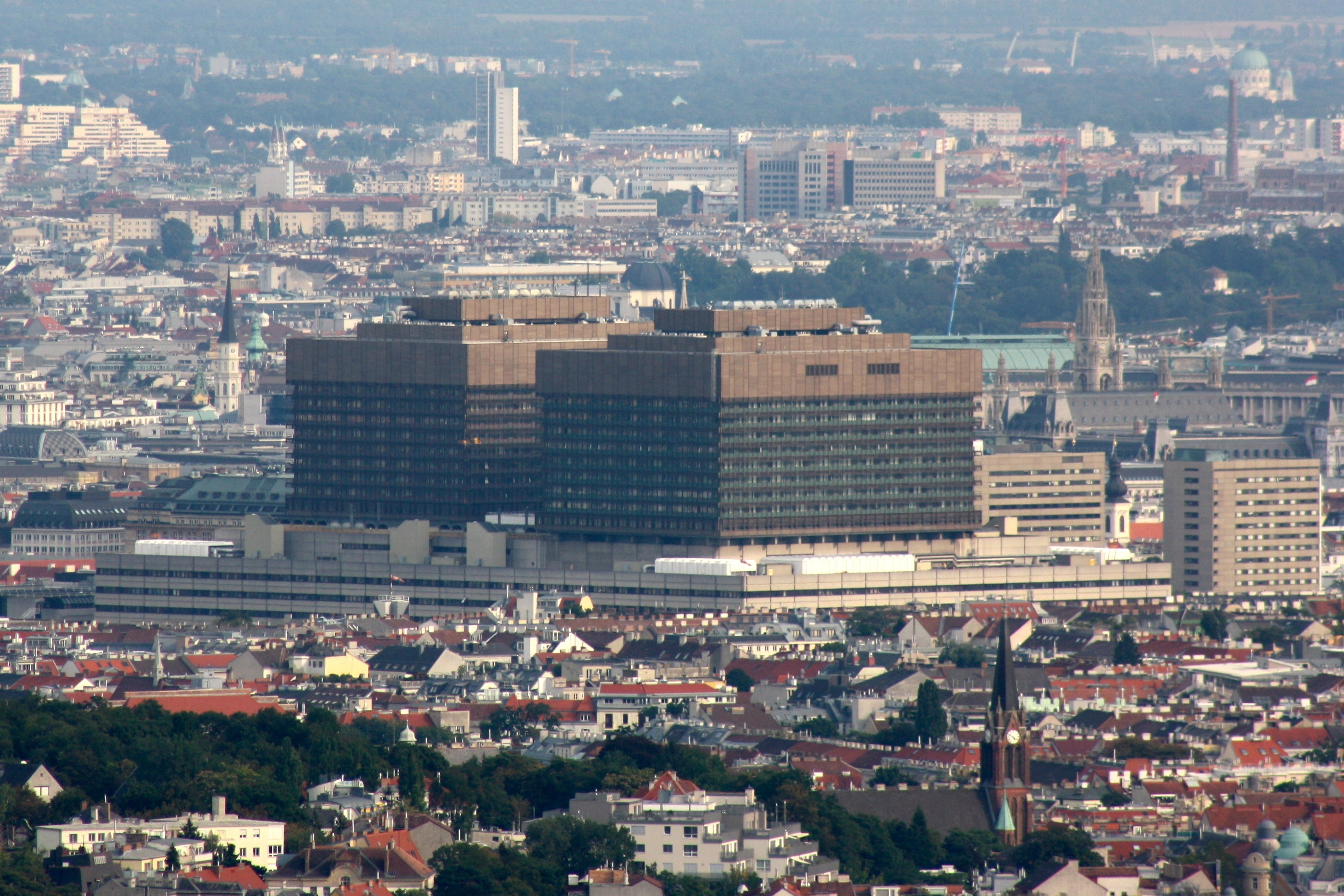 Allgemeines Krankenhaus Wien, Ansicht vom Neuberg in Wien-Döbling.